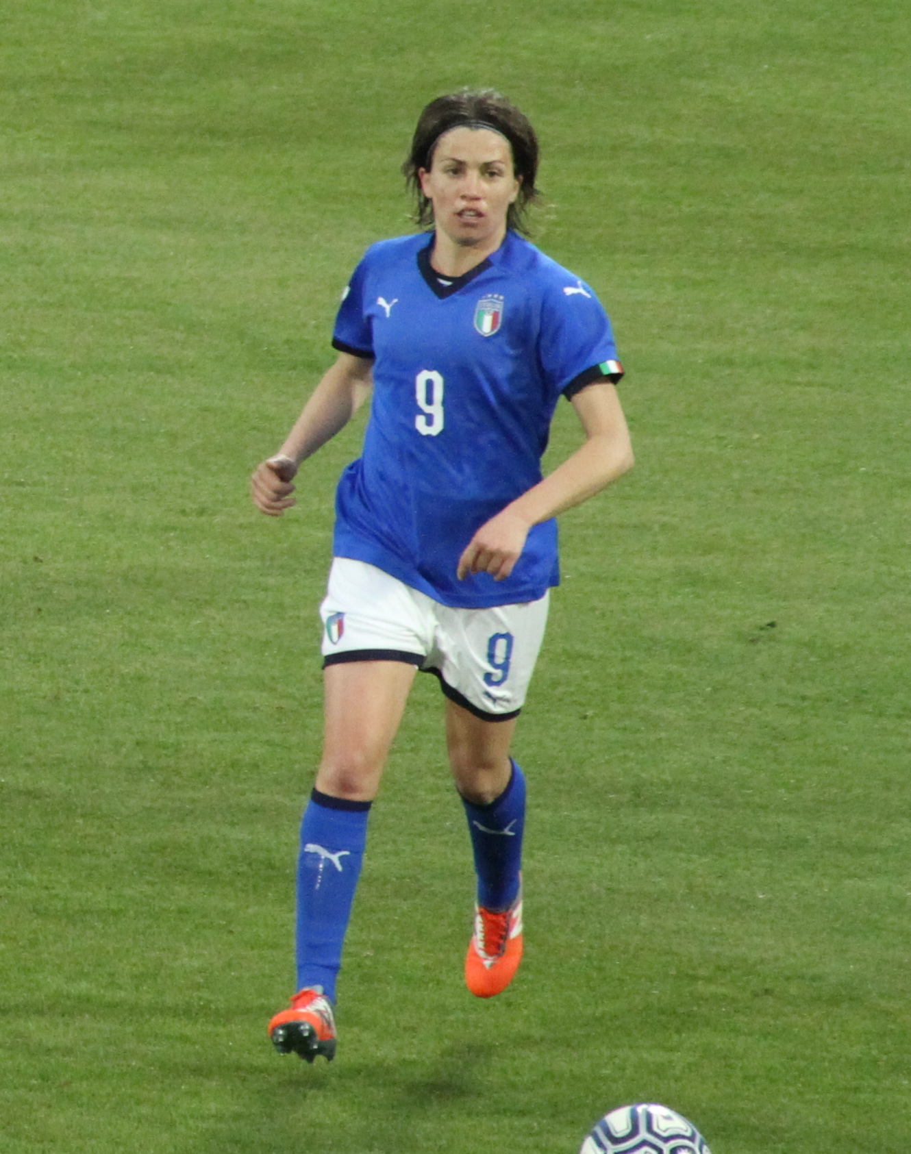 Ferrara (Italia), stadio Paolo Mazza, 10 aprile 2018. Italia vs Belgio, qualificazioni al Mondiale di Francia 2019: l'attaccante italiana Daniela Sabatino in azione.